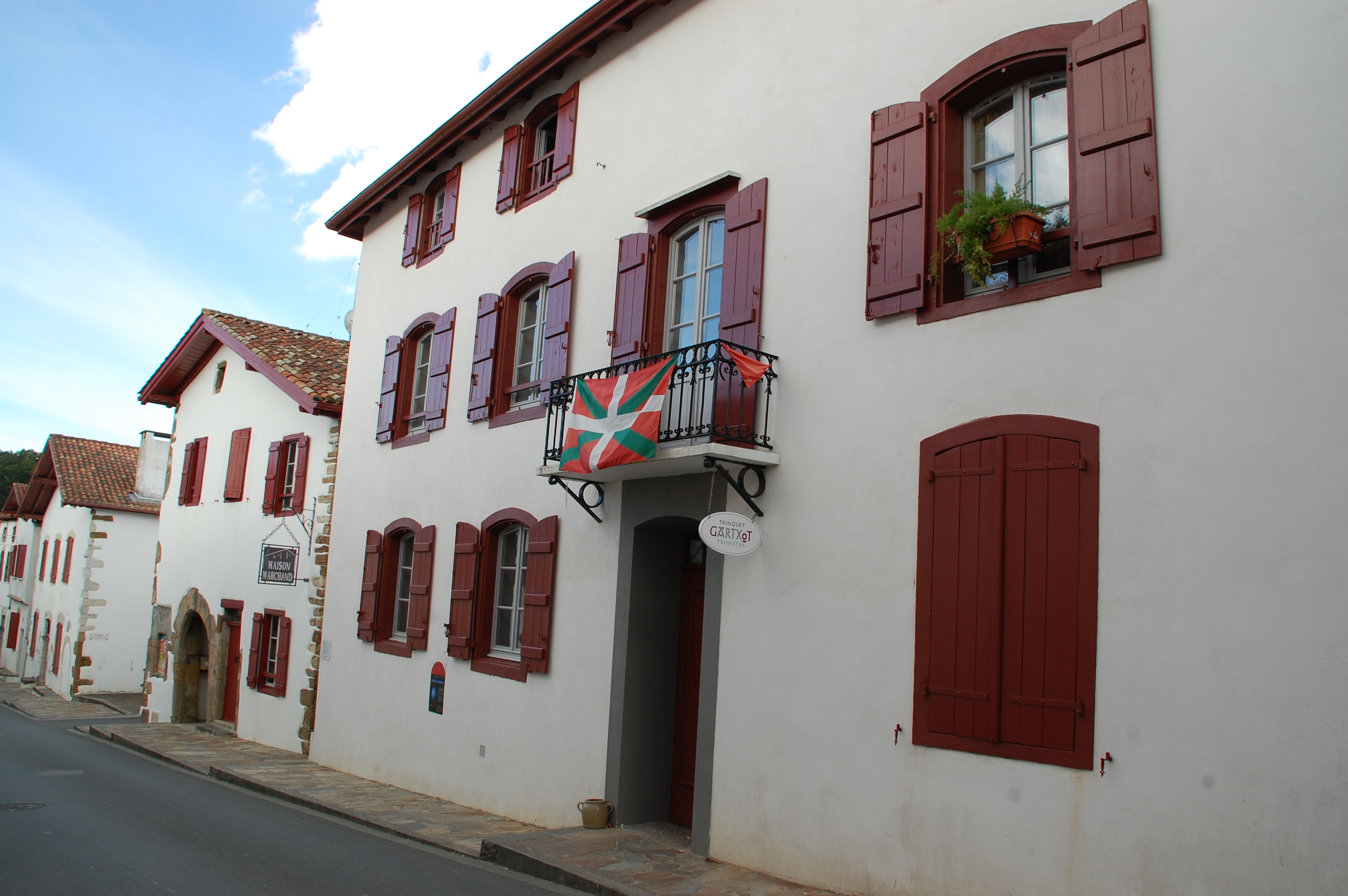 Trinquet Gartxot, ancien jeu de paume.